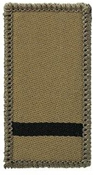 Leutnant